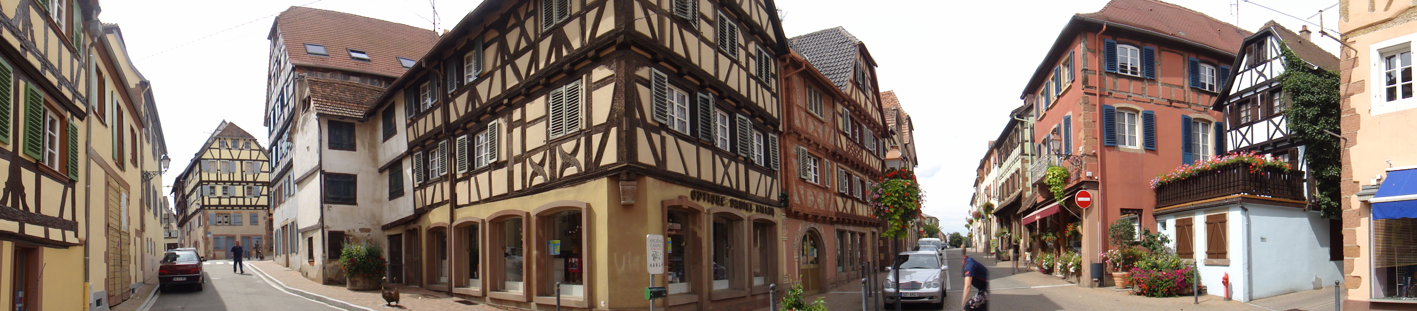 Alsace, Bas-Rhin, Bouxwiller, Photo panoramique, Grand-Rue.